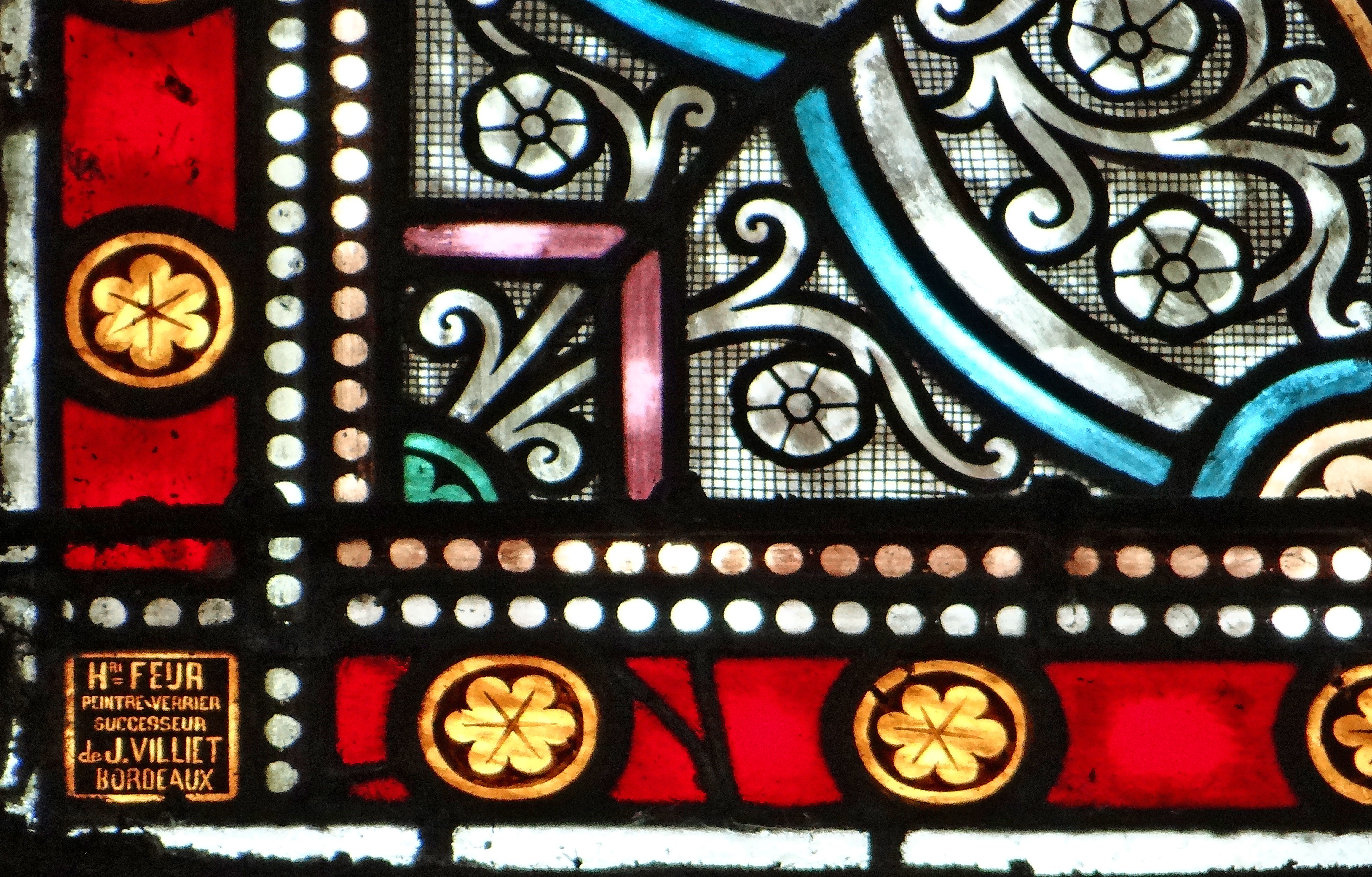 Laroque-Timbaut - Eglise Notre-Dame - Signature du vitrail représentant saint Germain par le maître-verrier Henri Feur